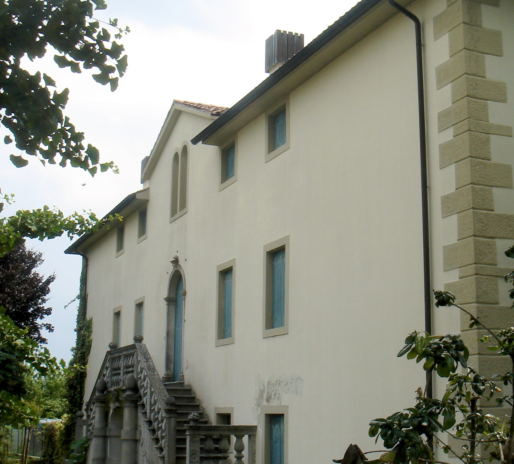 San Fior (Treviso): Villa Pampanini (XVII secolo), facciata laterale, rivolta verso l'adiacente area di servizio.